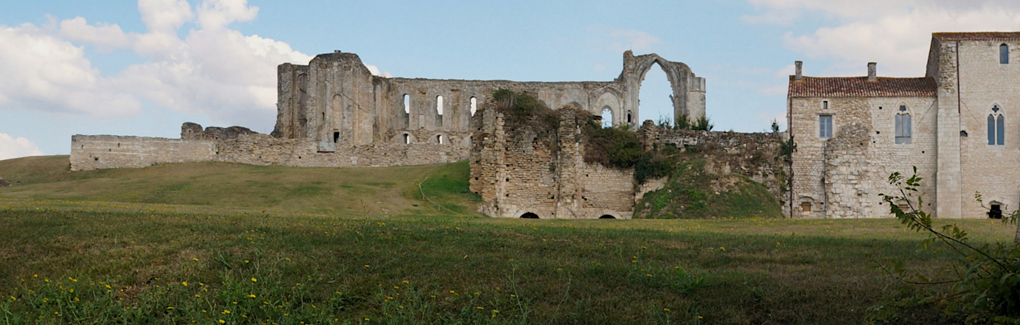 Cathédrale Saint-Pierre de Maillezais Vendée Pays de la Loire.- France .